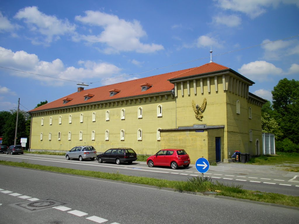 Hochbunker aus dem 2. Weltkrieg, Rheinhafenstraße, Karlsruhe